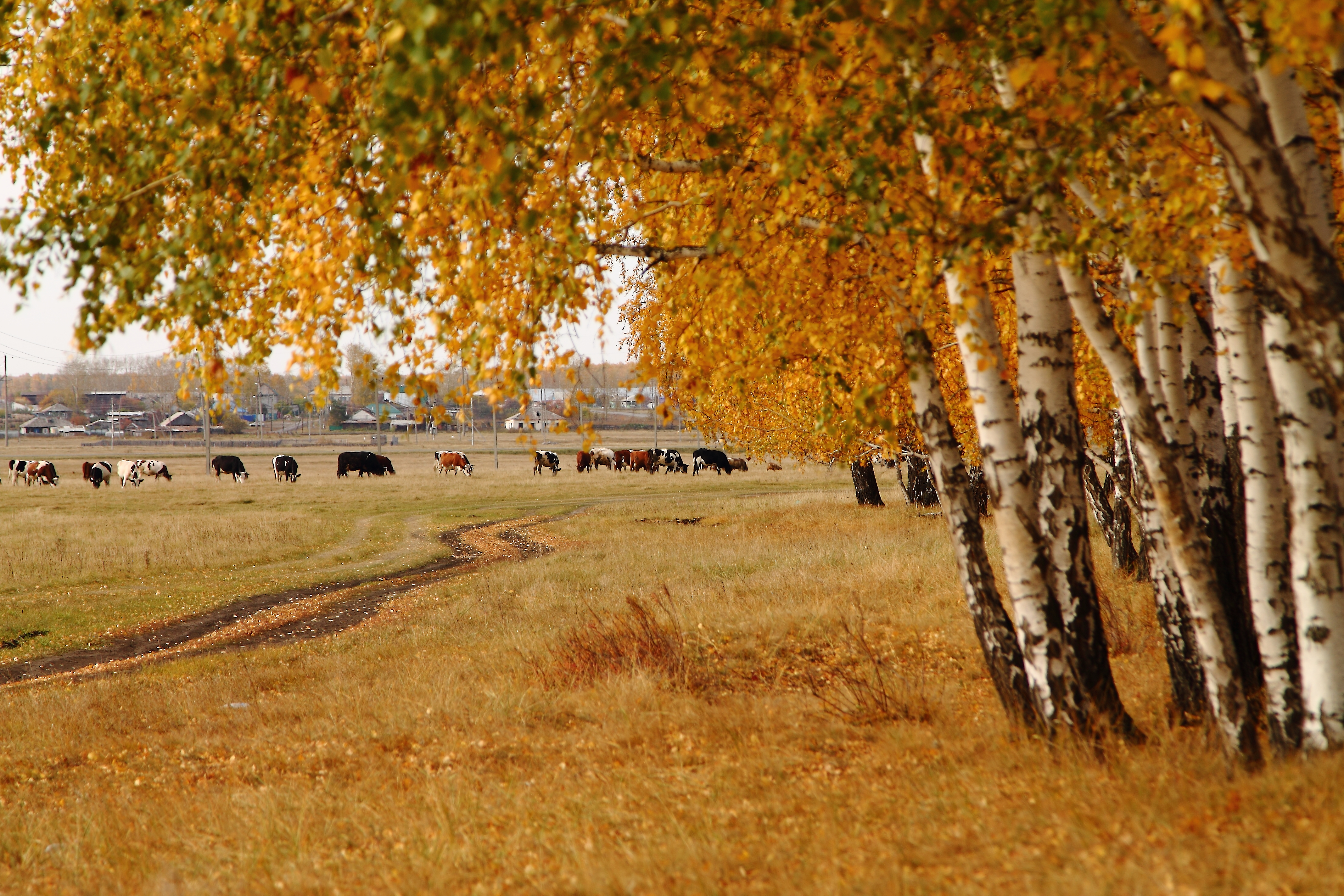 Мокроусовский заказник: Мокроусовский район, Курганская область This image is related to the protected area of Russia number 4510078